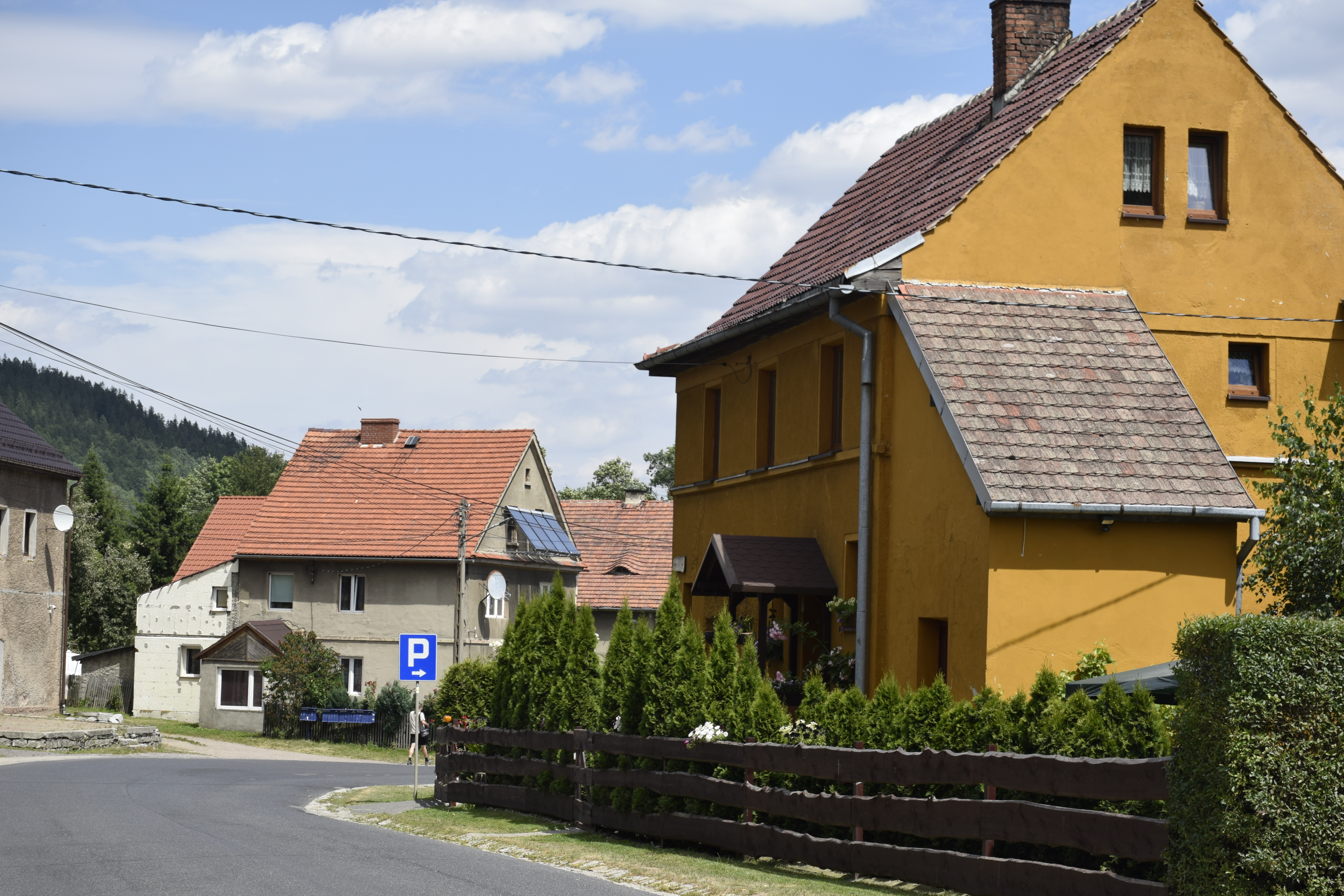 Lubomin (województwo dolnośląskie). Polska.